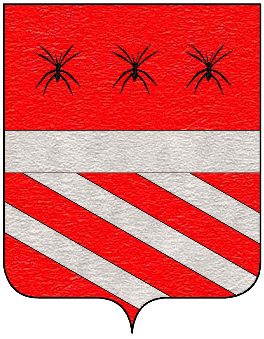 Stemma della famiglia Ragnina (Ranjina)